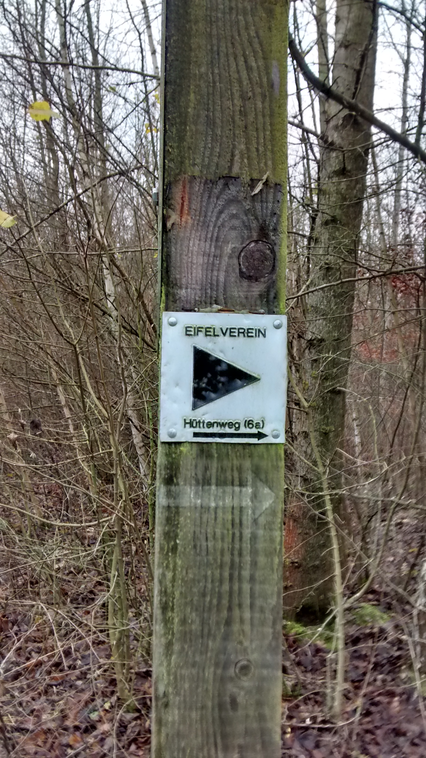 Impressionen aus der südöstlichen Umgebung des Blausteinsees und des Naherholungsgebiets Dürwiß vom Dezember 2014.